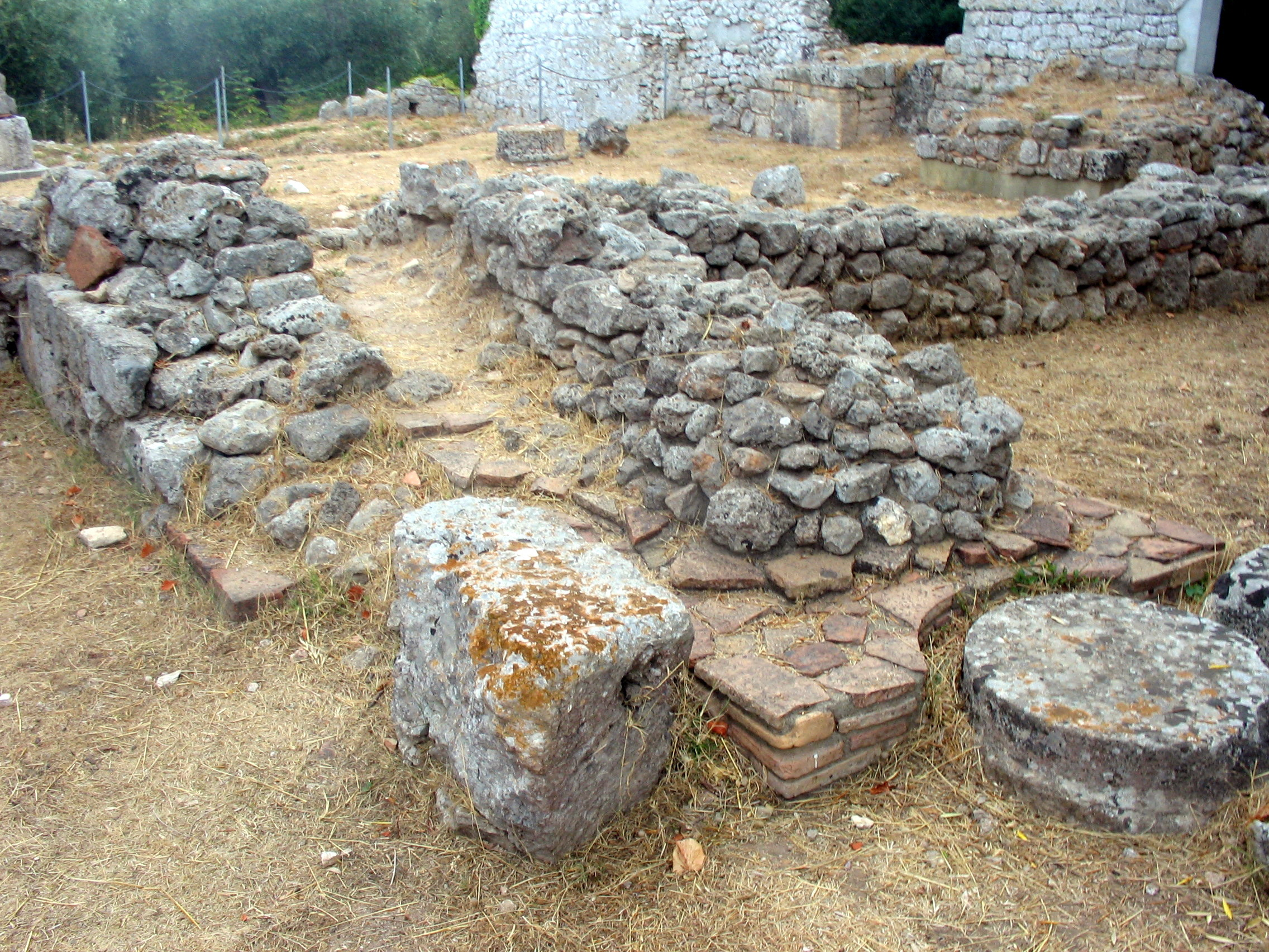 Cosa, Ansedonia, Orbetello, Toscana, Italia